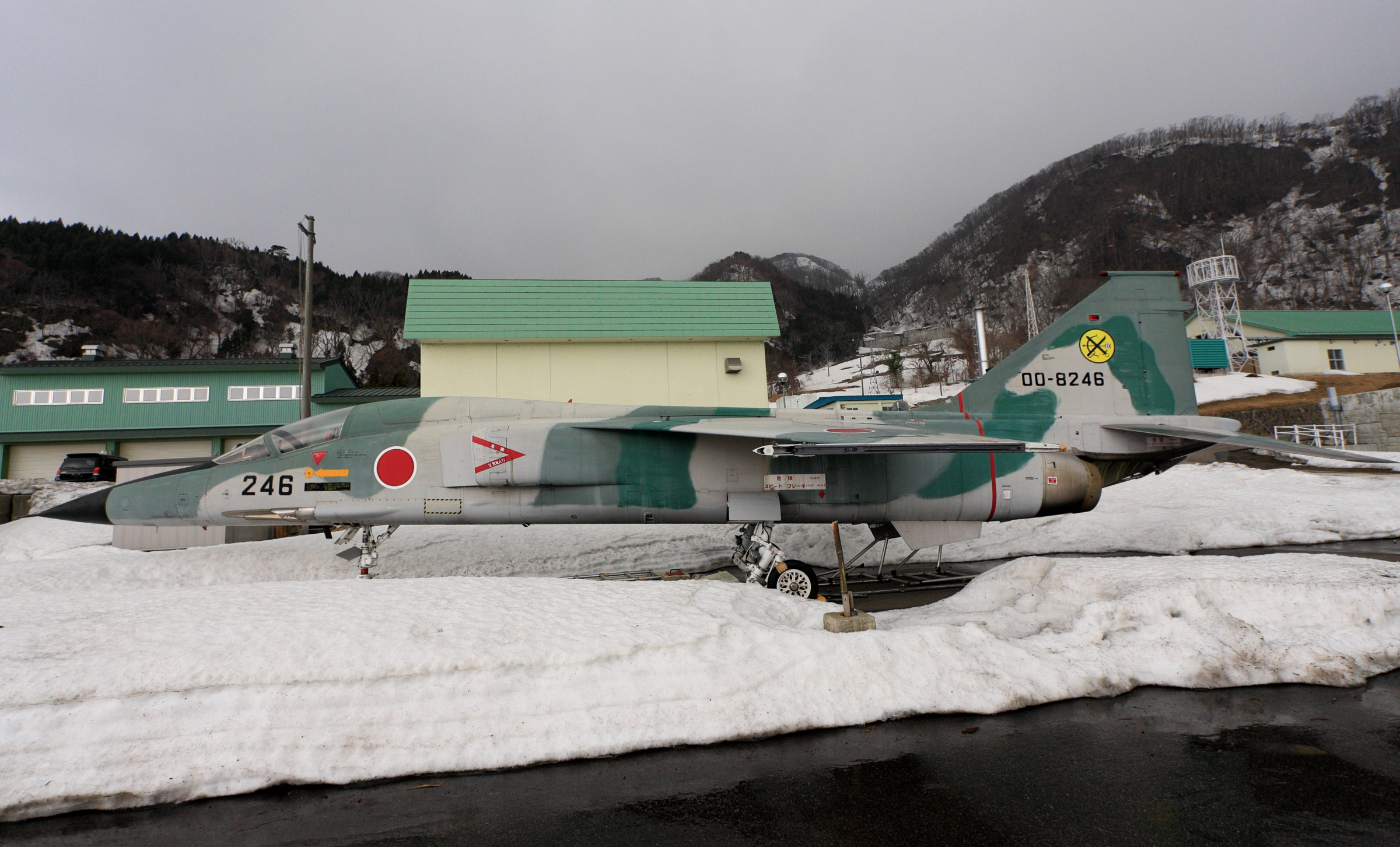 航空自衛隊佐渡分屯基地のゲートガード、三菱F-1支援戦闘機